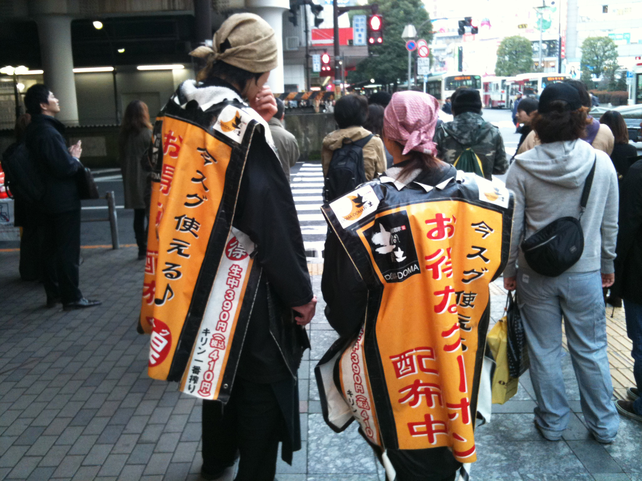 Advertisements